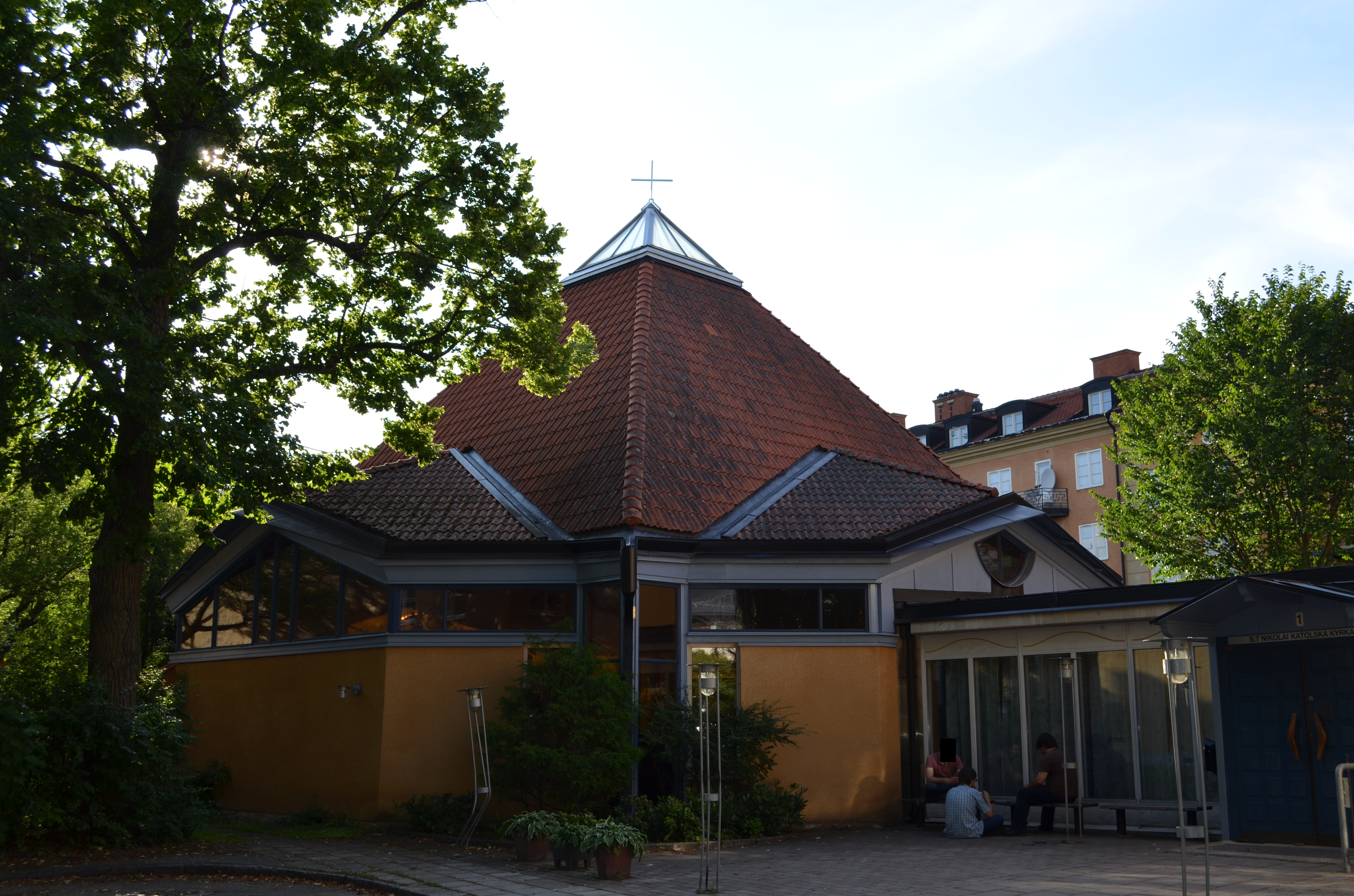 Sankt Nikolai kyrka, Linköping fotograferad under Kruosio och Mannen av börds sightseeing i Linköping.